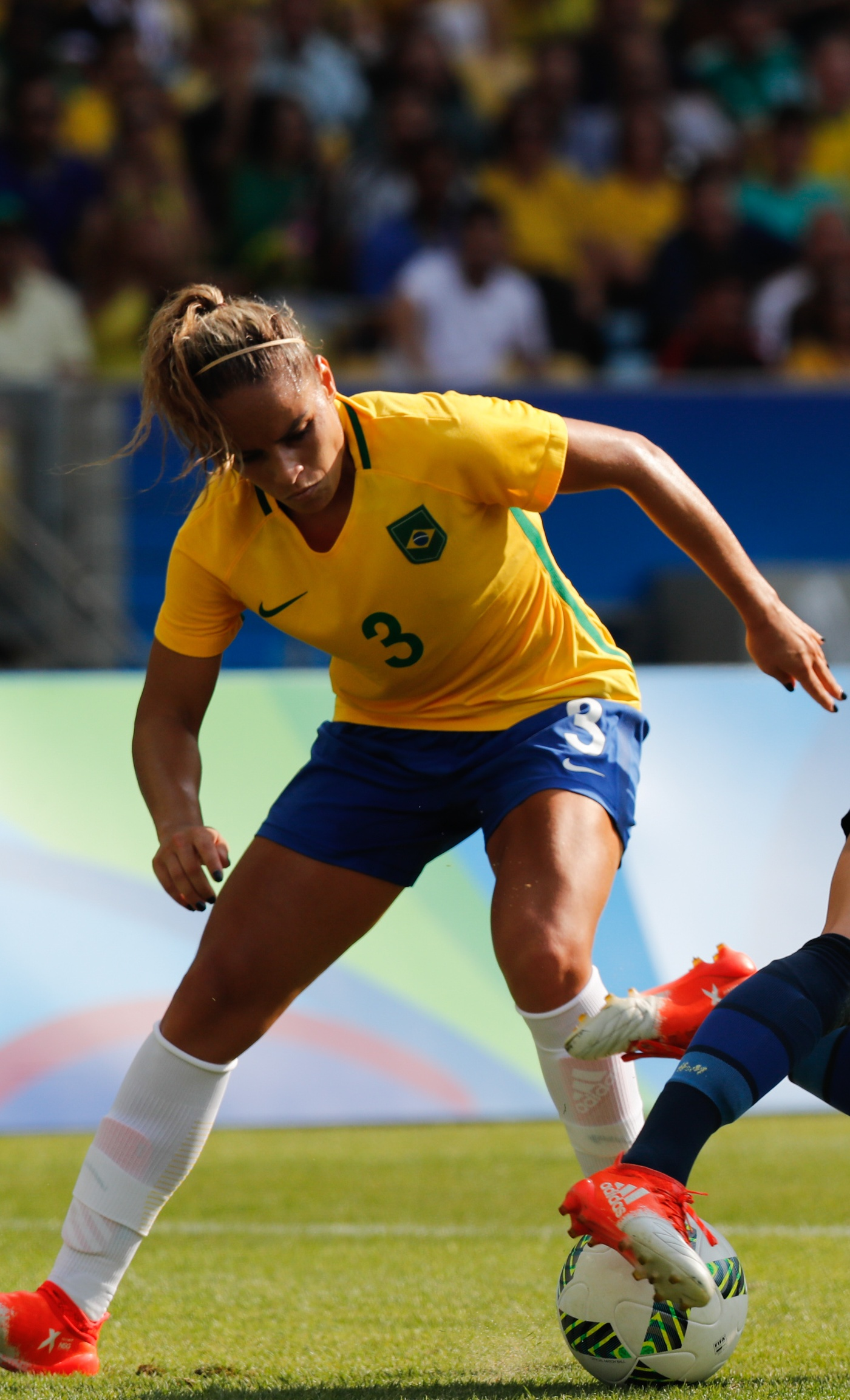 Mônica Hickmann no Maracanã, Rio de Janeiro, 16/8/16, semifinal olímpica contra a Suécia (Fernando Frazão/Agência Brasil)